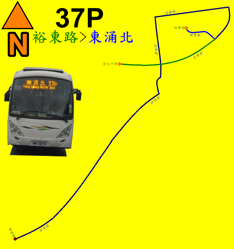 中文（香港）: 嶼巴37P線的走線圖